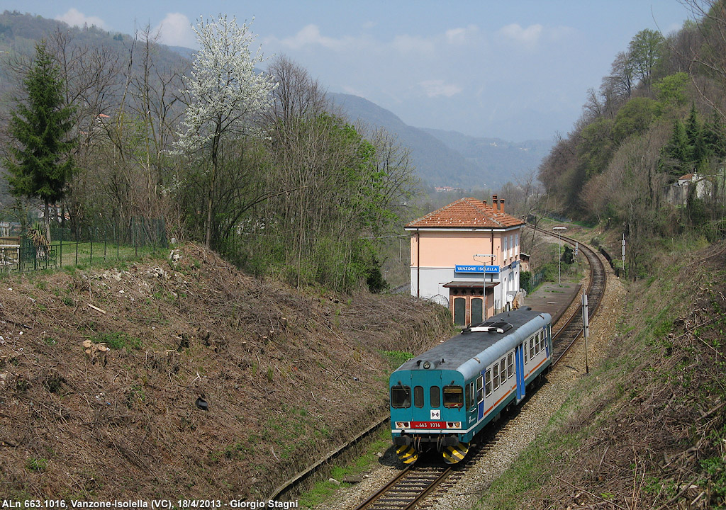 L'ex fermata ferroviaria di Vanzone-Isolella. Transita l'automotrice diesel ALn 663.1016 delle Ferrovie dello Stato.